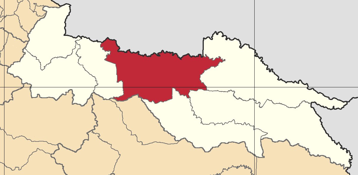 Mapa localizacor del cantón Lago Agrio, Sucumbíos, Ecuador